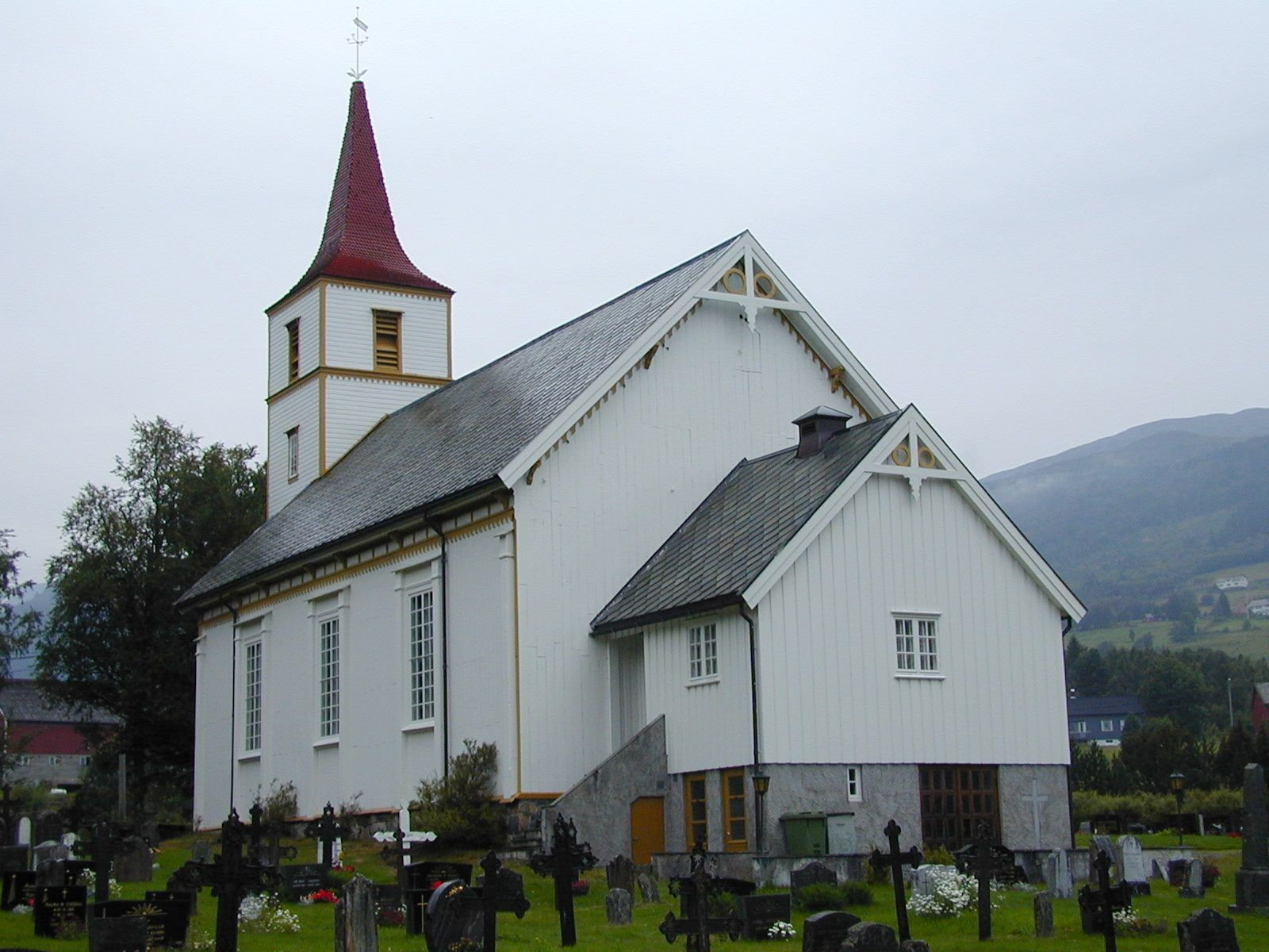 Fiksdal kirke i Vestnes. Foto: Max Ingar Mørk. Fra Riksantikvarens Kulturminnesøk.